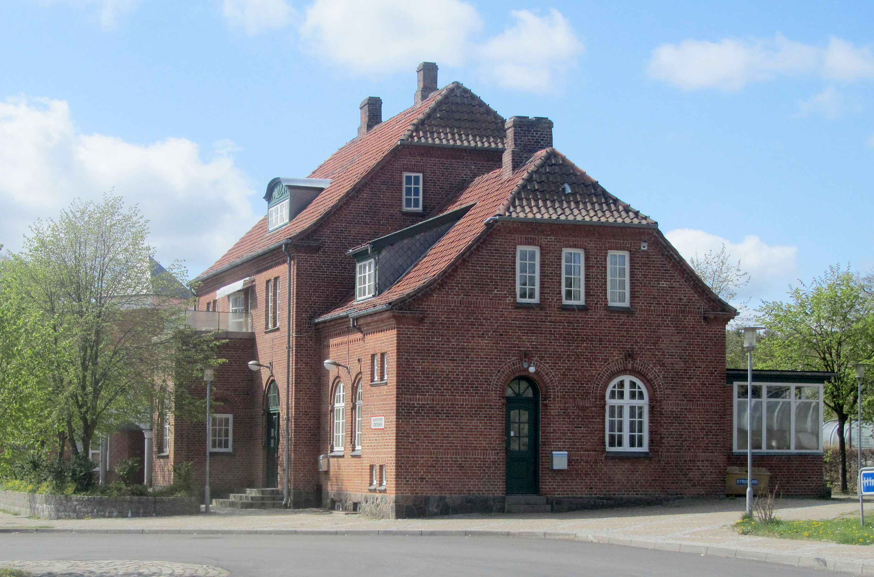 Hinnerup Station